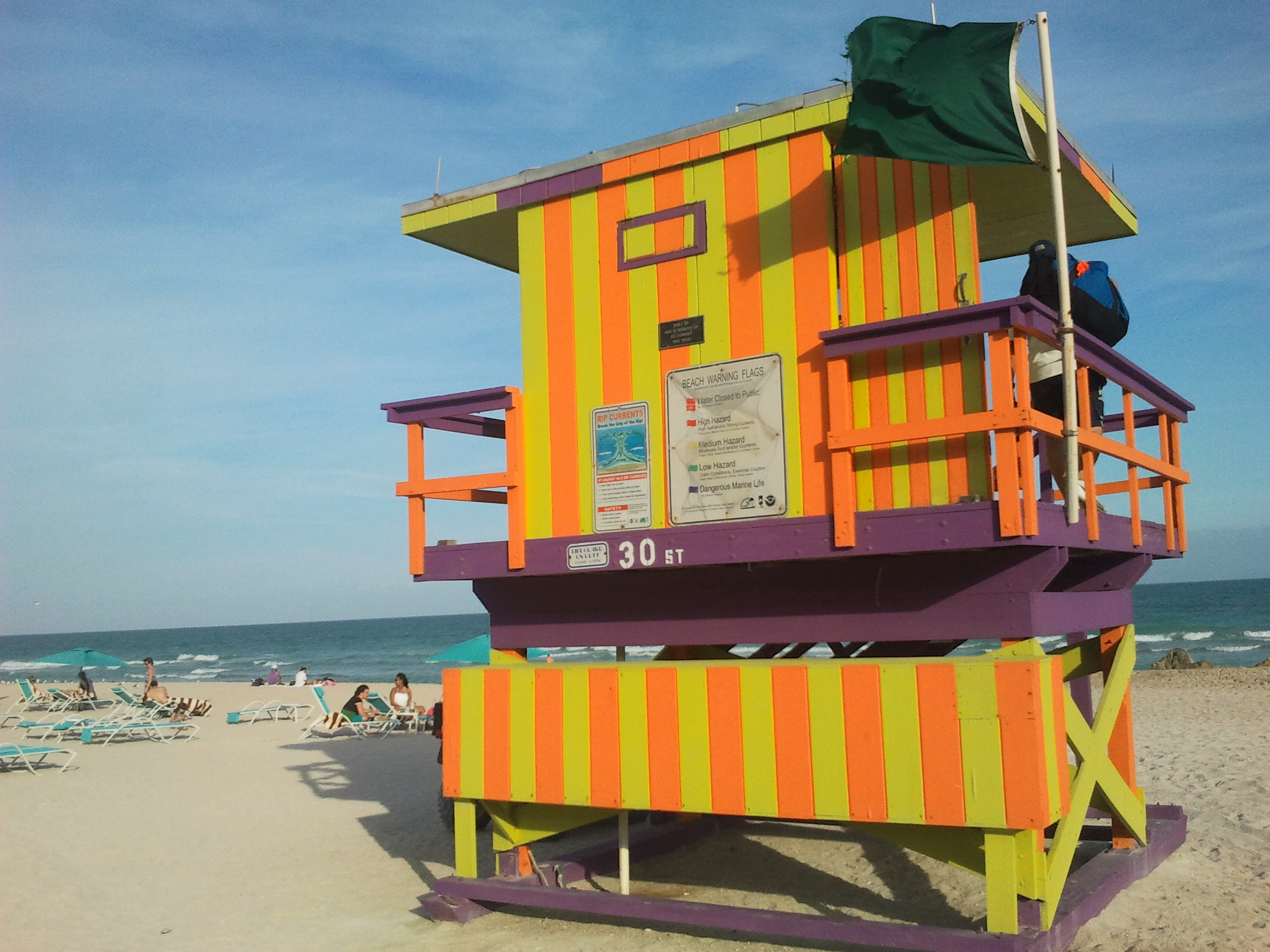 Miami Beach, 31. Straße, Strandwache